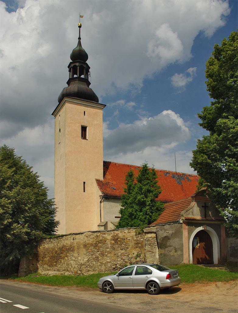 Kościół w Wadochowicach.